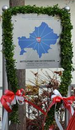 Gedenktafel der Mitte Unterfrankens in Büchold.